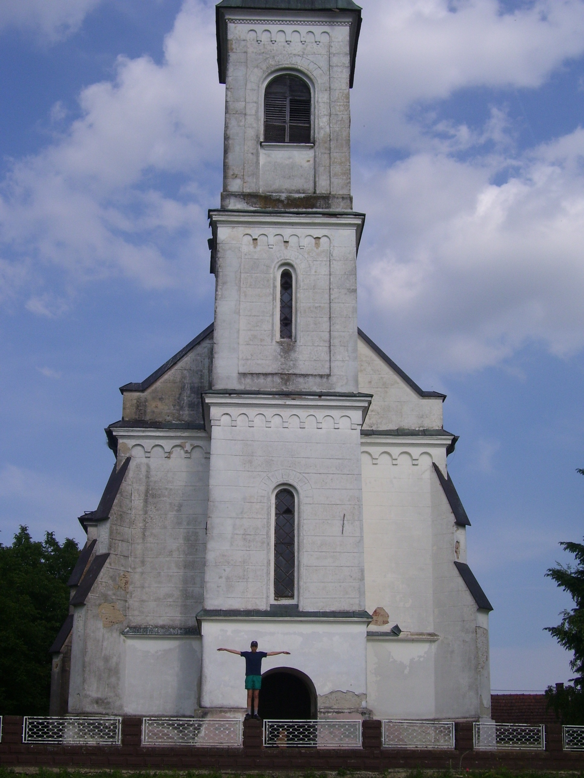 nevinačka crkva